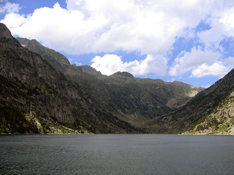 Embassament de Cavallers al Parc Nacional d'Aigüestortes i Estany de Sant Maurici (Alt Pirineu de Lleida, Catalunya).